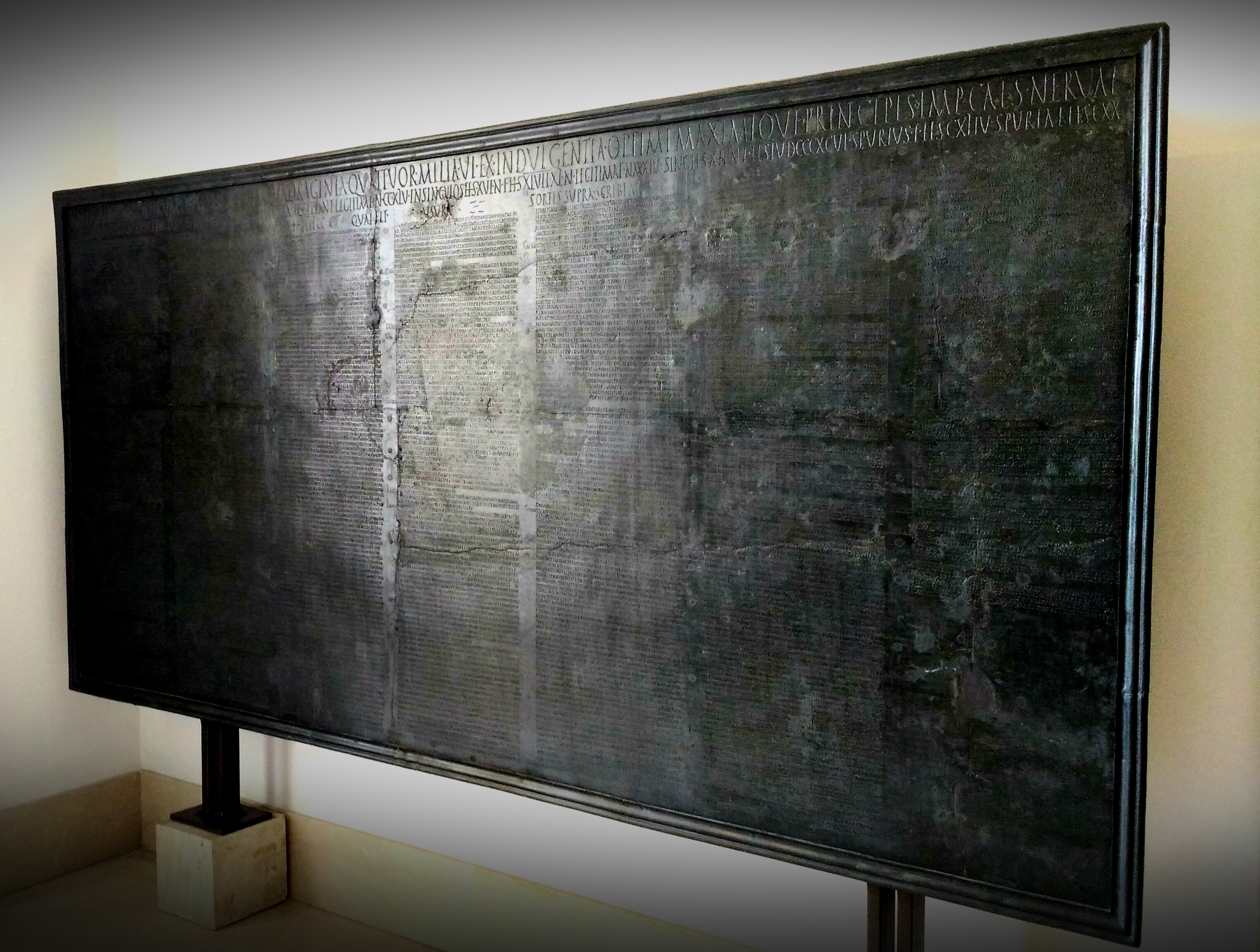 Tabula alimentaire triaianea